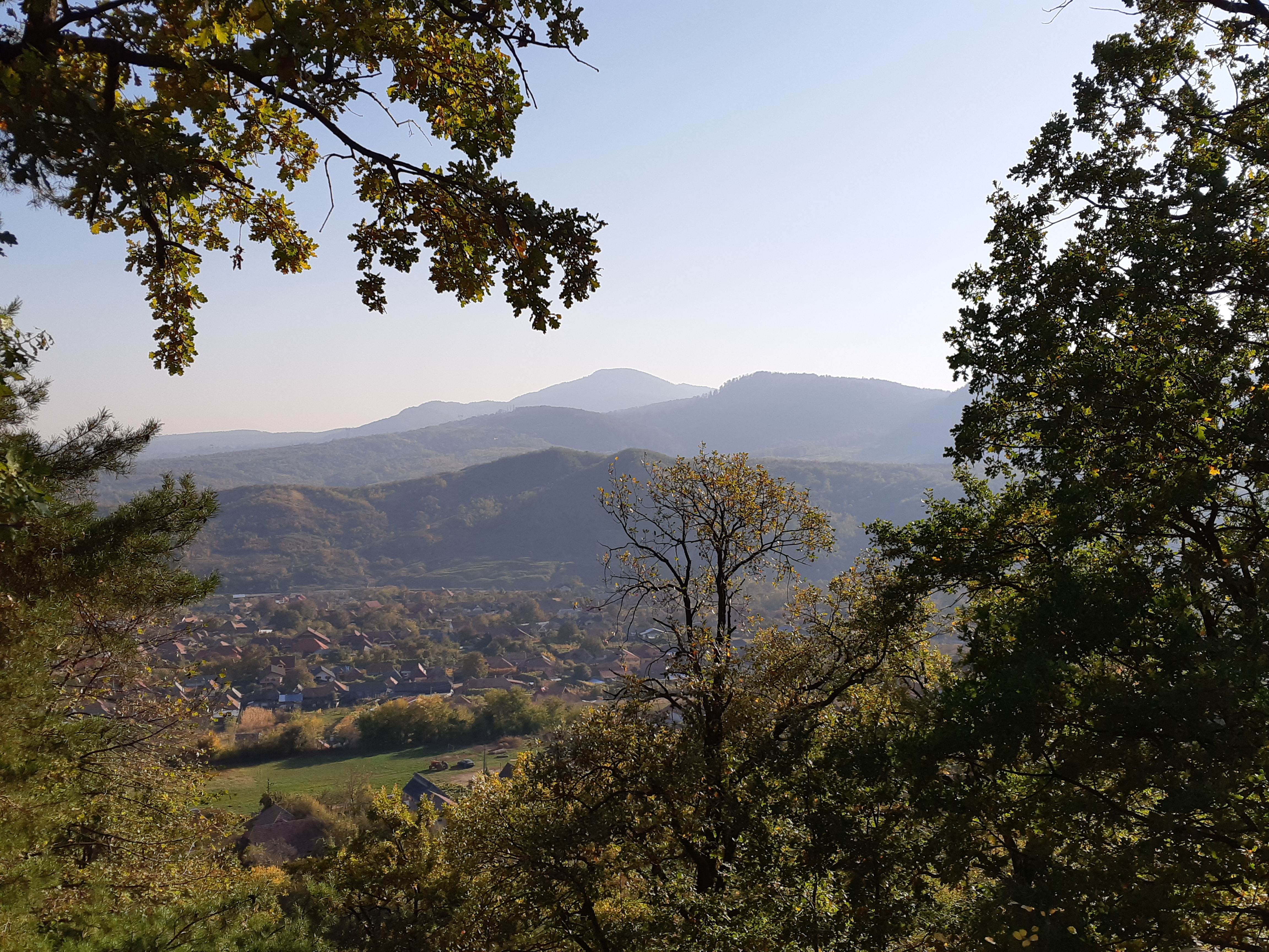 Valea Oituzului în dreptul satului Oituz (Bacău) de la cota 368, locul unde se află Monumentul Eroilor Cavaleriști din Primul Război Mondial